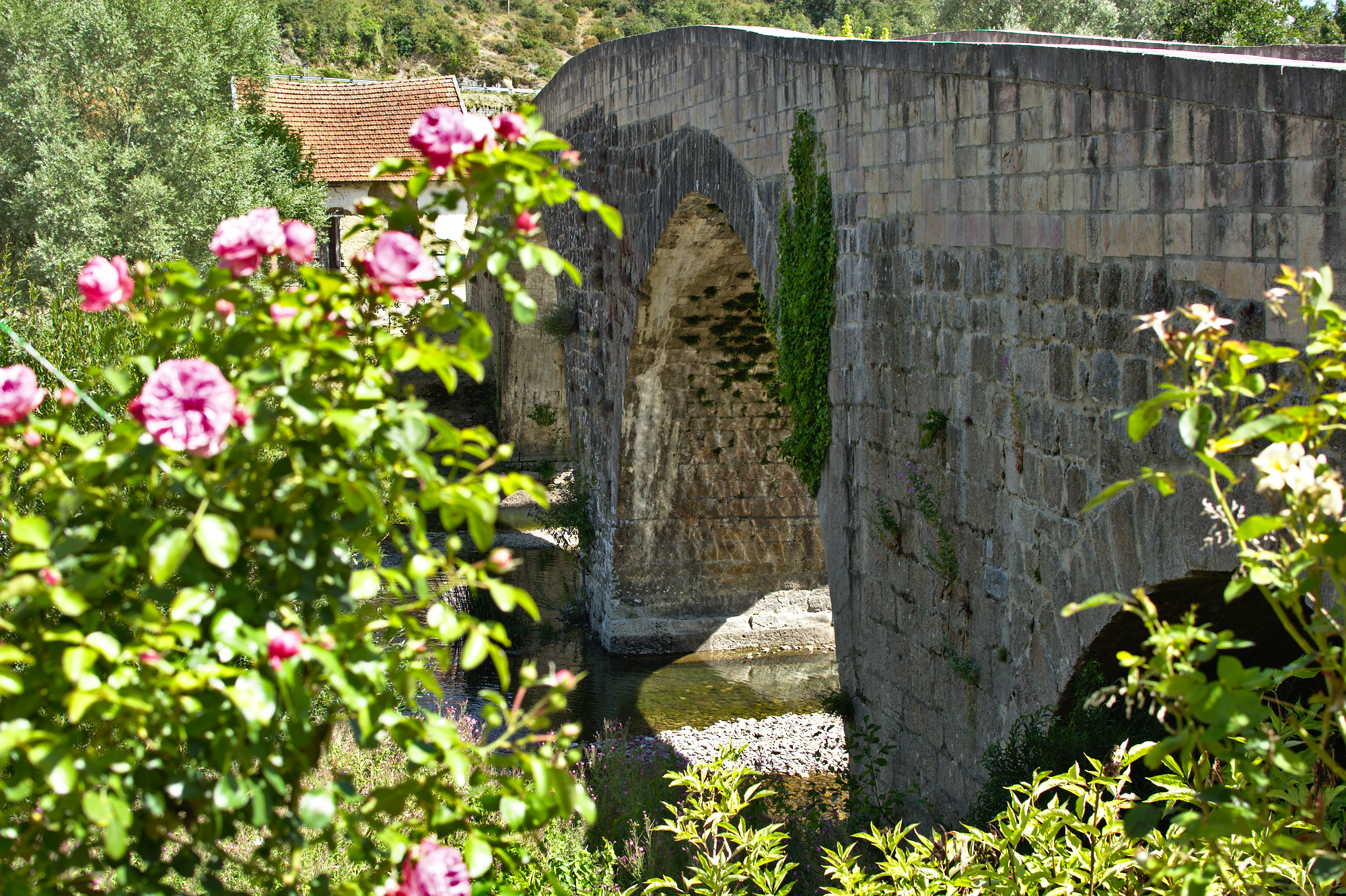 Arive